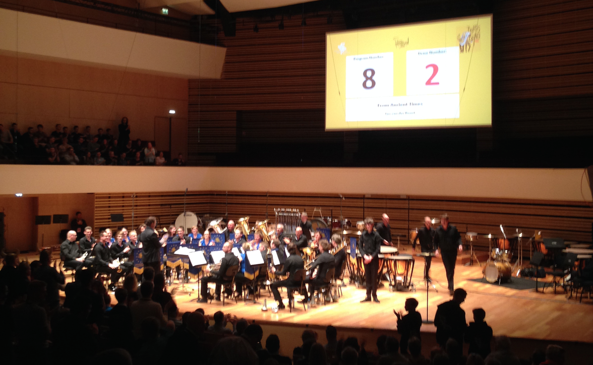 Provinciale Brass Band Groningen, EM for brassband 2016 i Lille